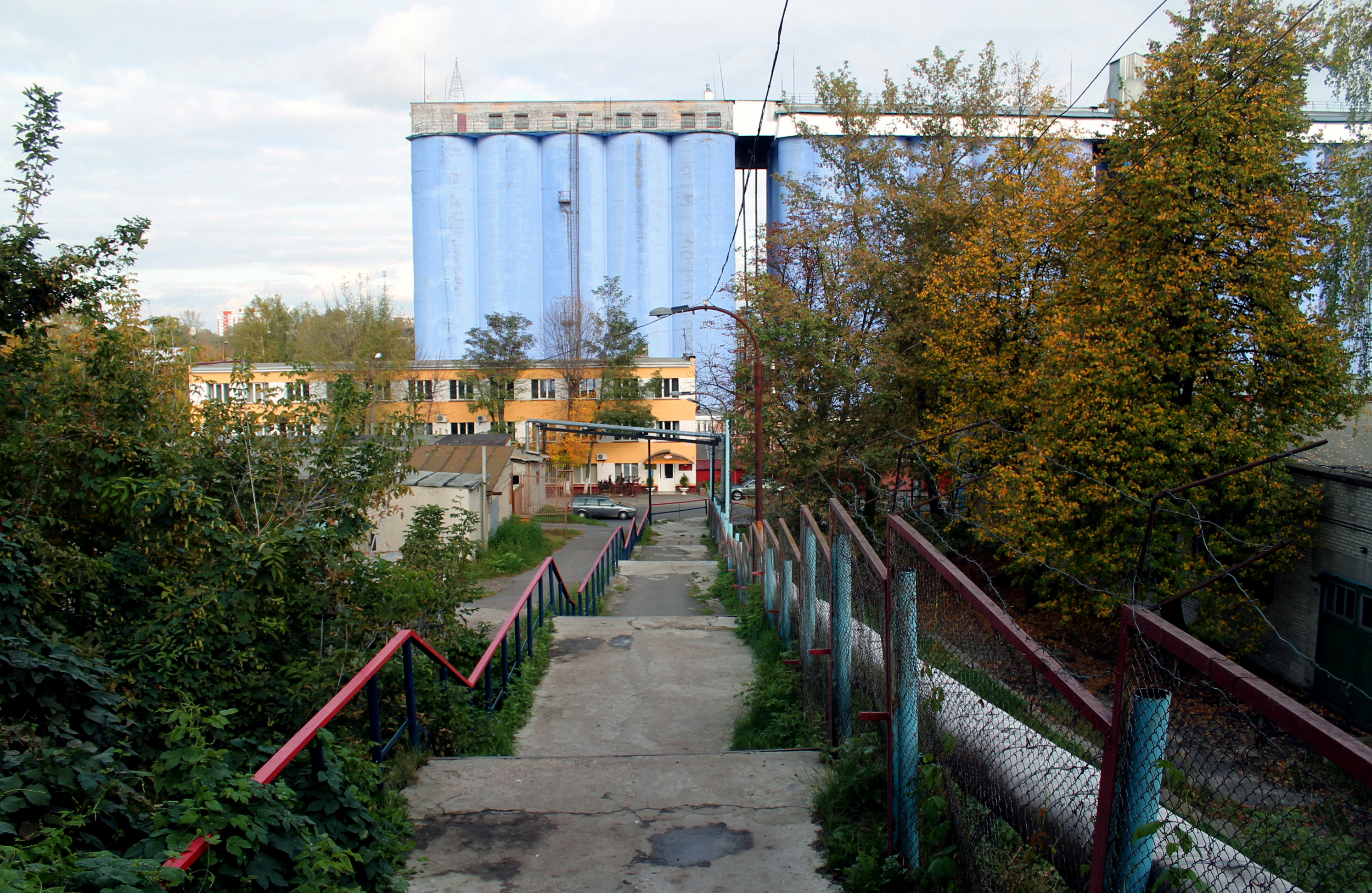 Спуск з вуліцы Партовай на вуліцу Падгорную (Гомель), 2012 г. Верагодная тэрыторыя колішняга яра Дзядно.